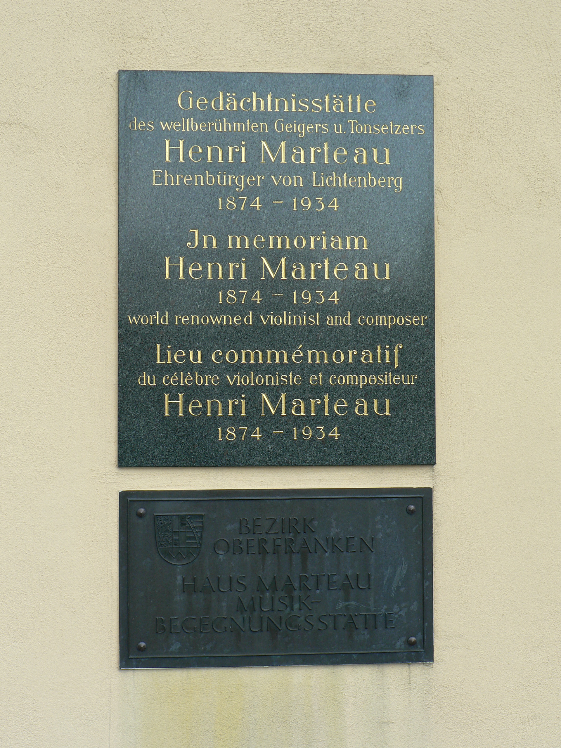 Gedenktafel für Henri Marteau an der Musikbegegnungsstätte Haus Marteau in Lichtenberg